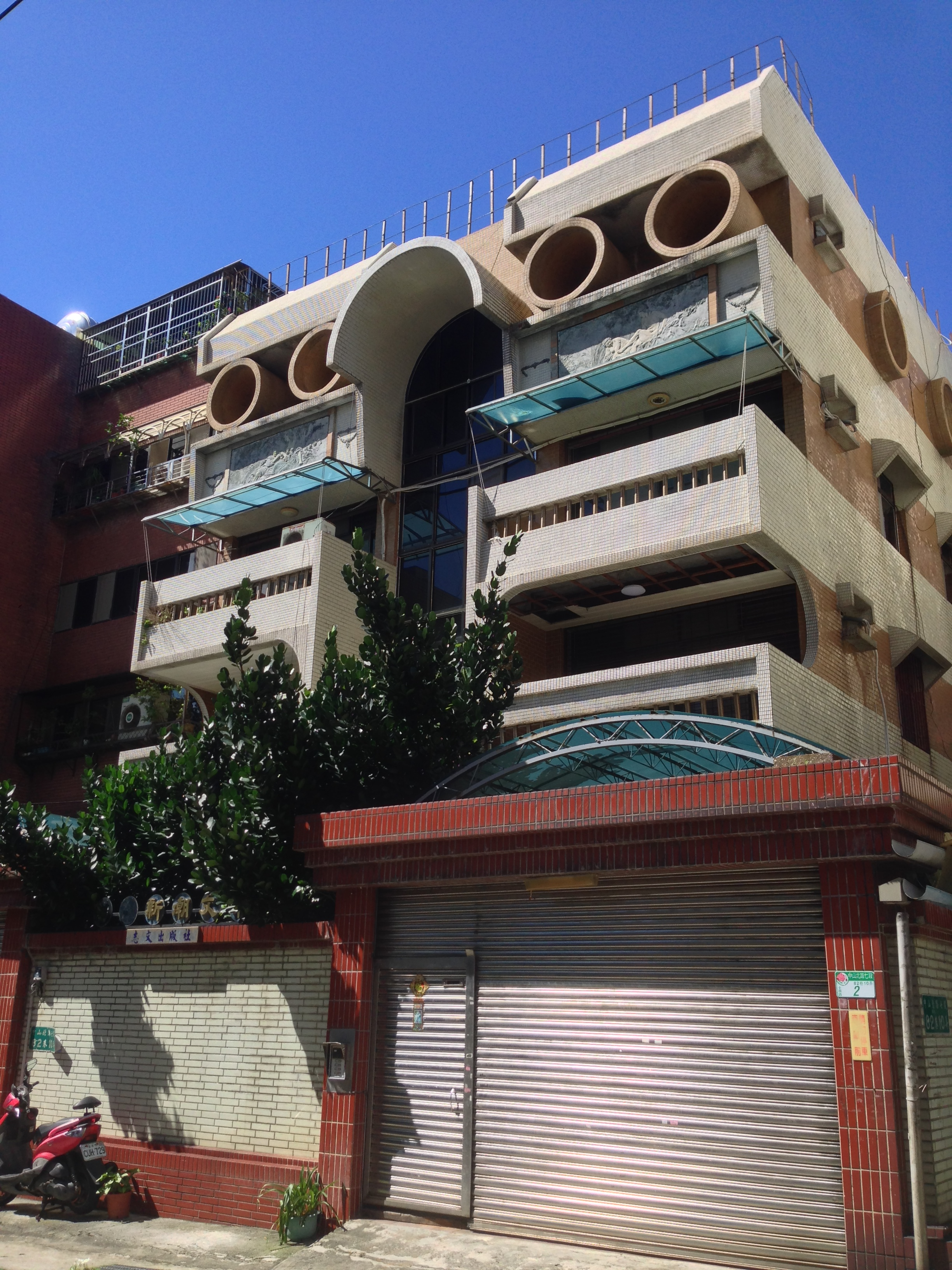 中文（台灣）: 志文出版社，位於臺北市士林區中山北路七段82巷10弄2號。